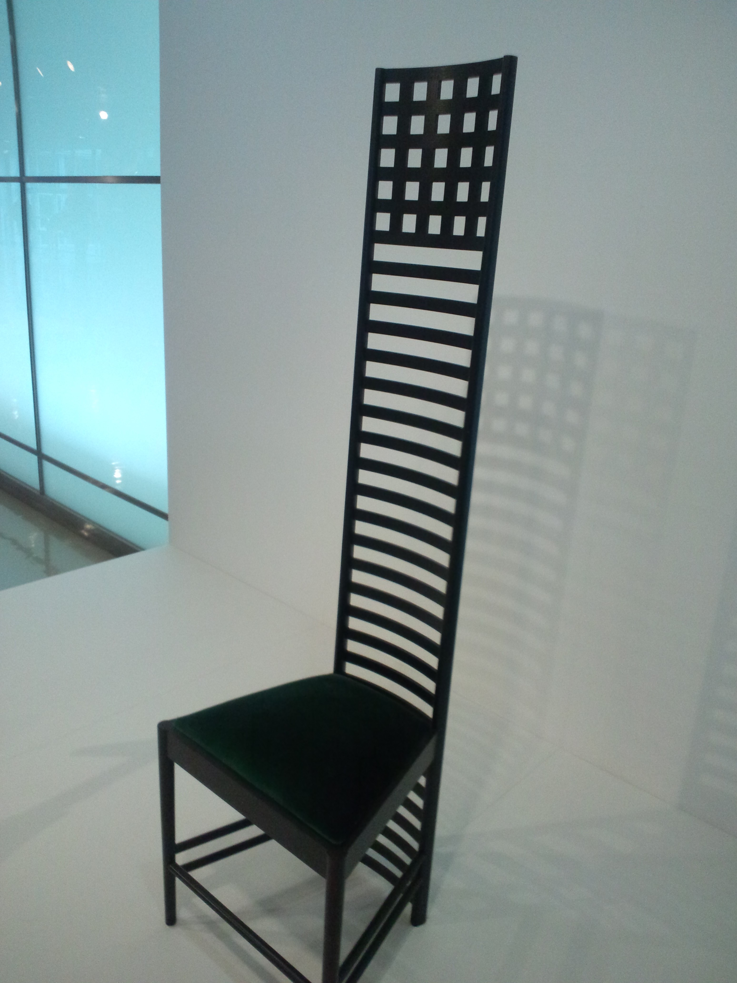 国立民族学博物館（大阪） 椅子＜ラダー・バック・チェア＞（連合王国、グラスゴー、制作者：チャールズ・R・マッキントッシュ、2006年再制作、原作1903年）